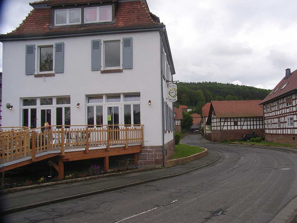 Unterrosphe, Ortsdurchfahrt an der alten Schule